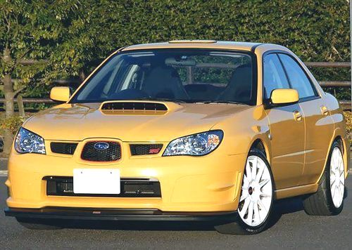 2006年 インプレッサWRX STI specC type RA-R 2007年投稿者撮影 Category:乗用車画像